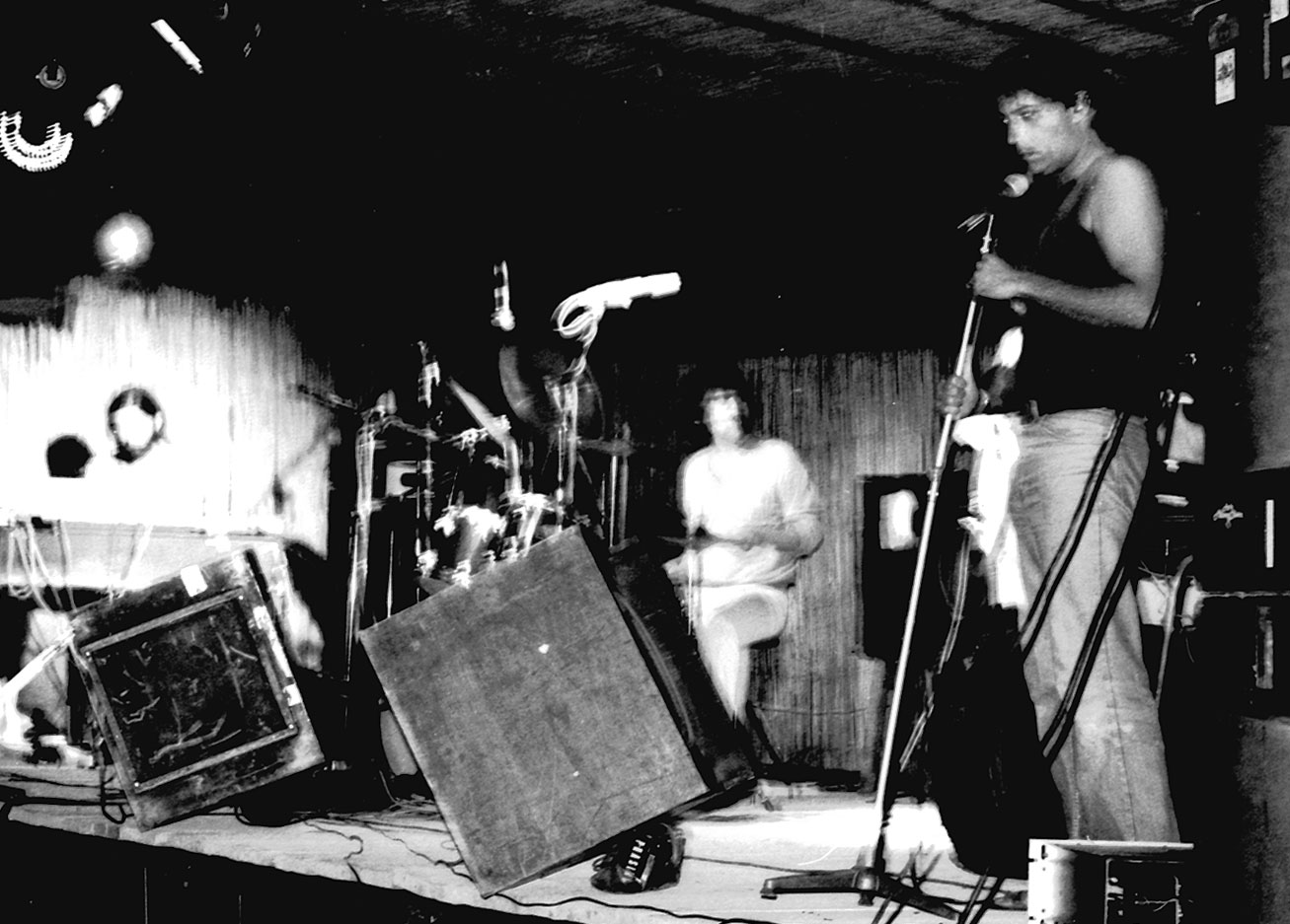 Demetrio Stratos in concerto AREA allo stadio di Castelmassa (RO), appena ritornati da Cuba agosto 1978, Raffaello Regoli, scansione da mio negativo, pubblico dominio, formato grande